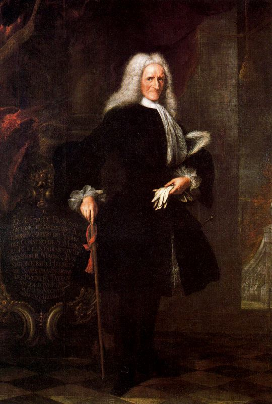 Retrato del aristócrata y funcionario español Francisco Antonio de Salcedo y Aguirre (1646-1729), primer marqués de Vadillo y corregidor de Madrid.